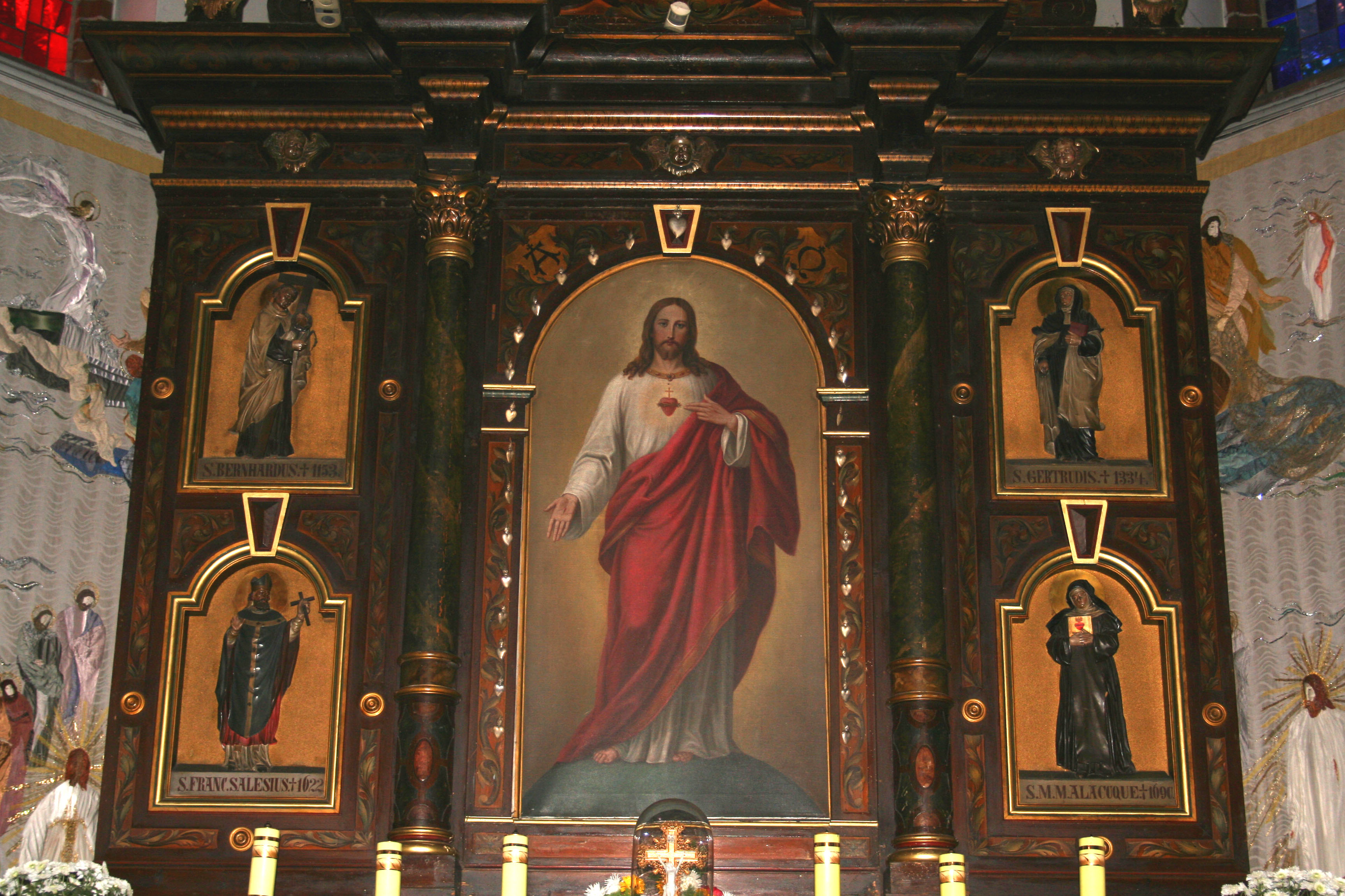 ołtarz główny w kościele Najświętszego_Serca_Pana_Jezusa w Koszęcinie, powiat lubliniecki